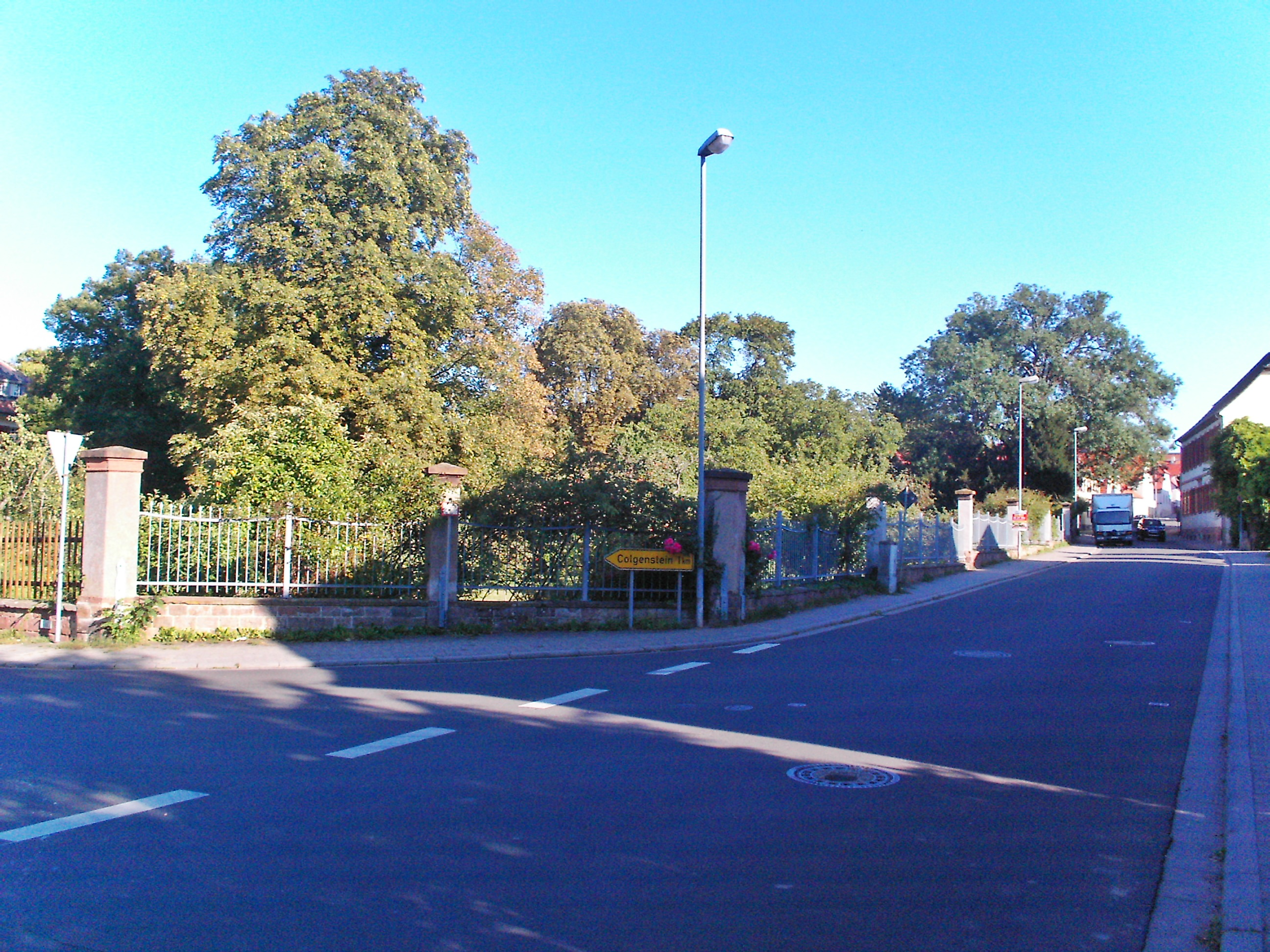 Schloßpark Heidesheim in Obrigheim (Pfalz), Rheinland-Pfalz. Das Schloss des gräflichen Hauses Leiningen-Heidesheim wurde 1794 durch Truppen der Französischen Revolution niedergebrannt.